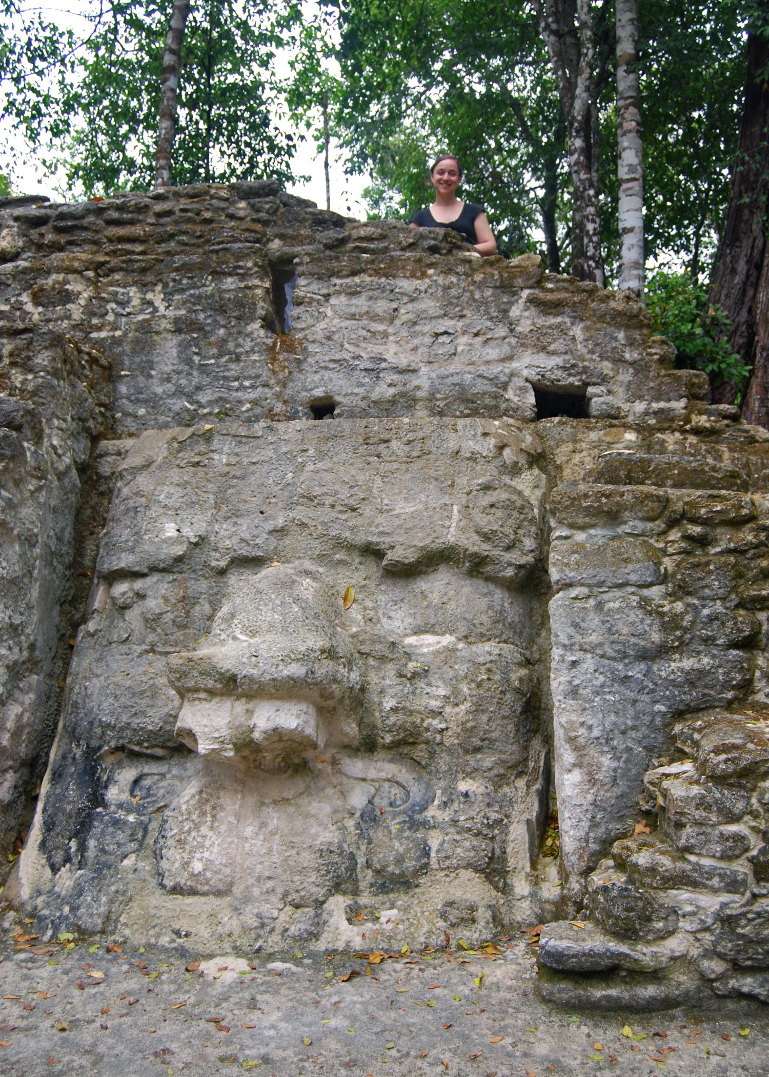 Constance at El Mirador